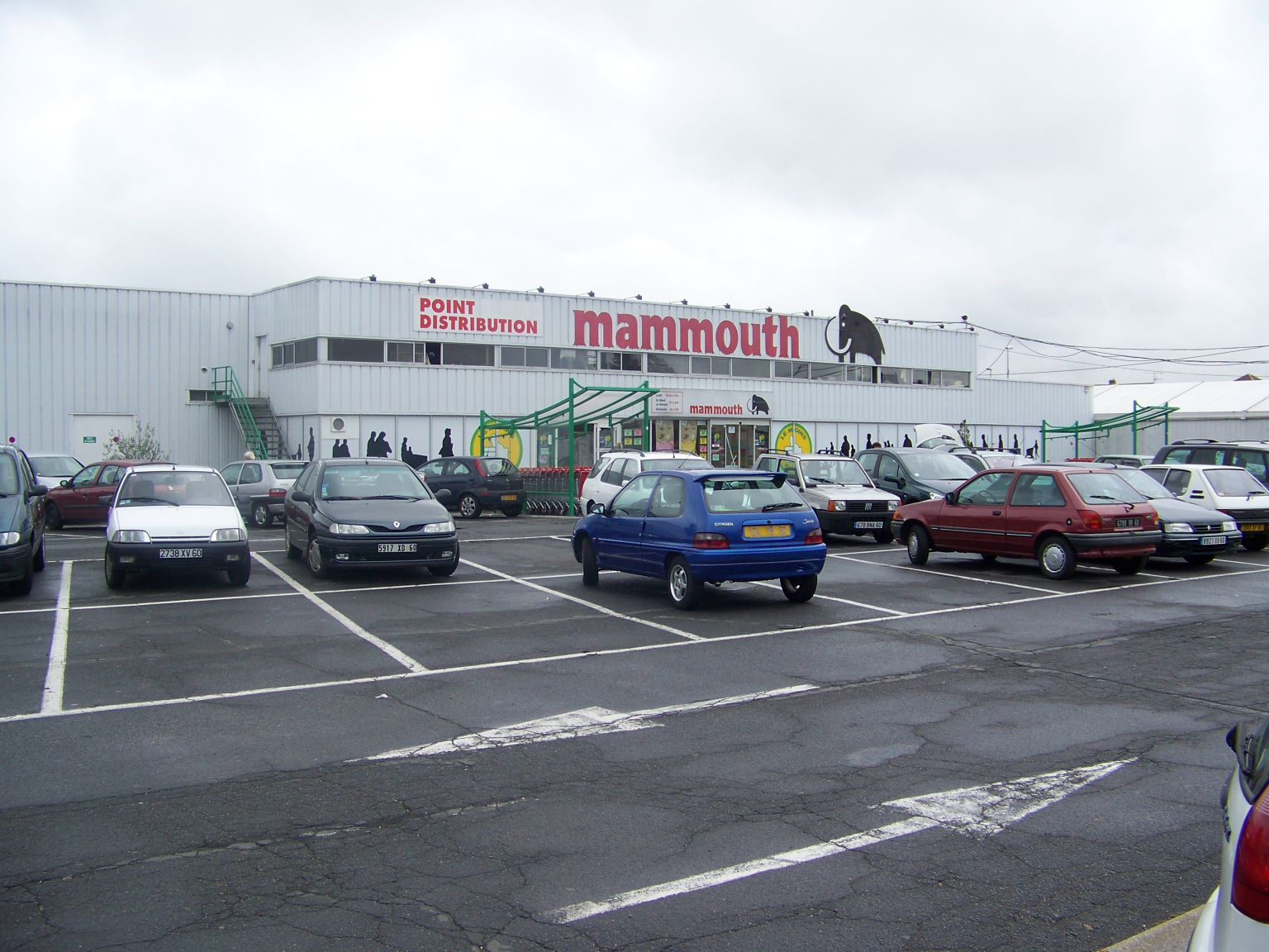 Façade de l'hypermarché Mammouth de La Croix St Ouen